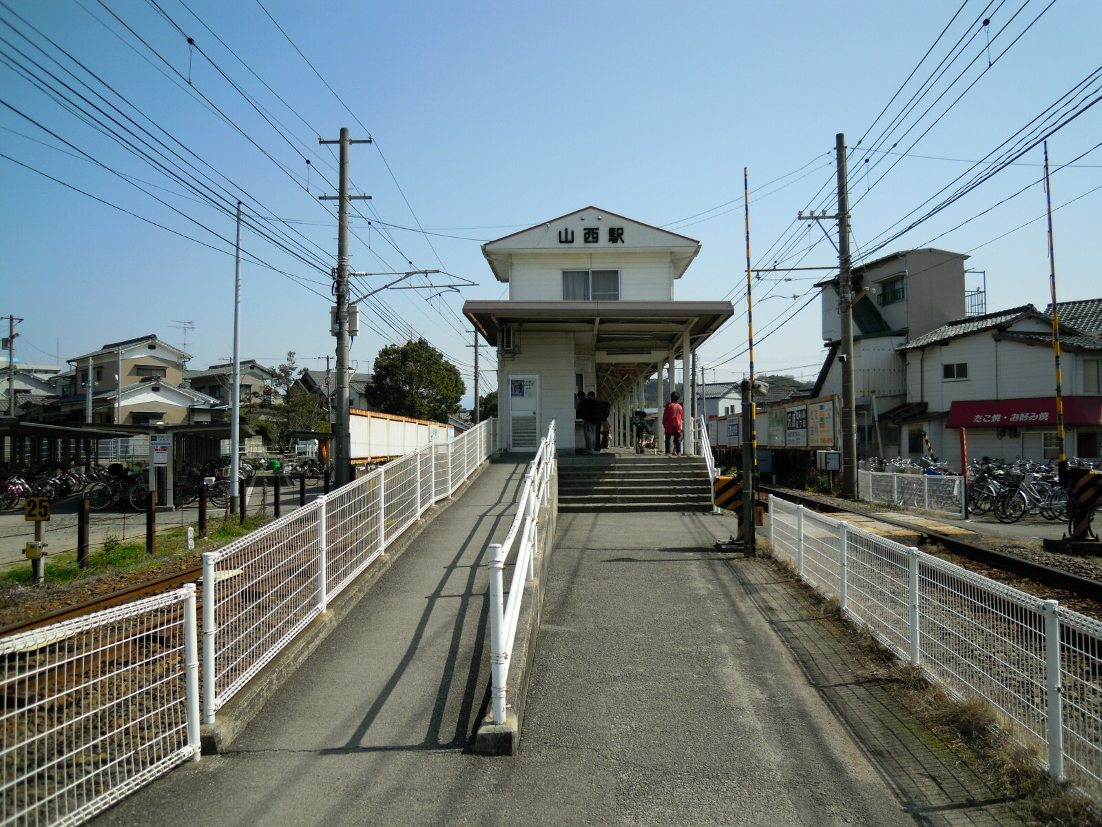 Iyo Railway Yamanishi Station